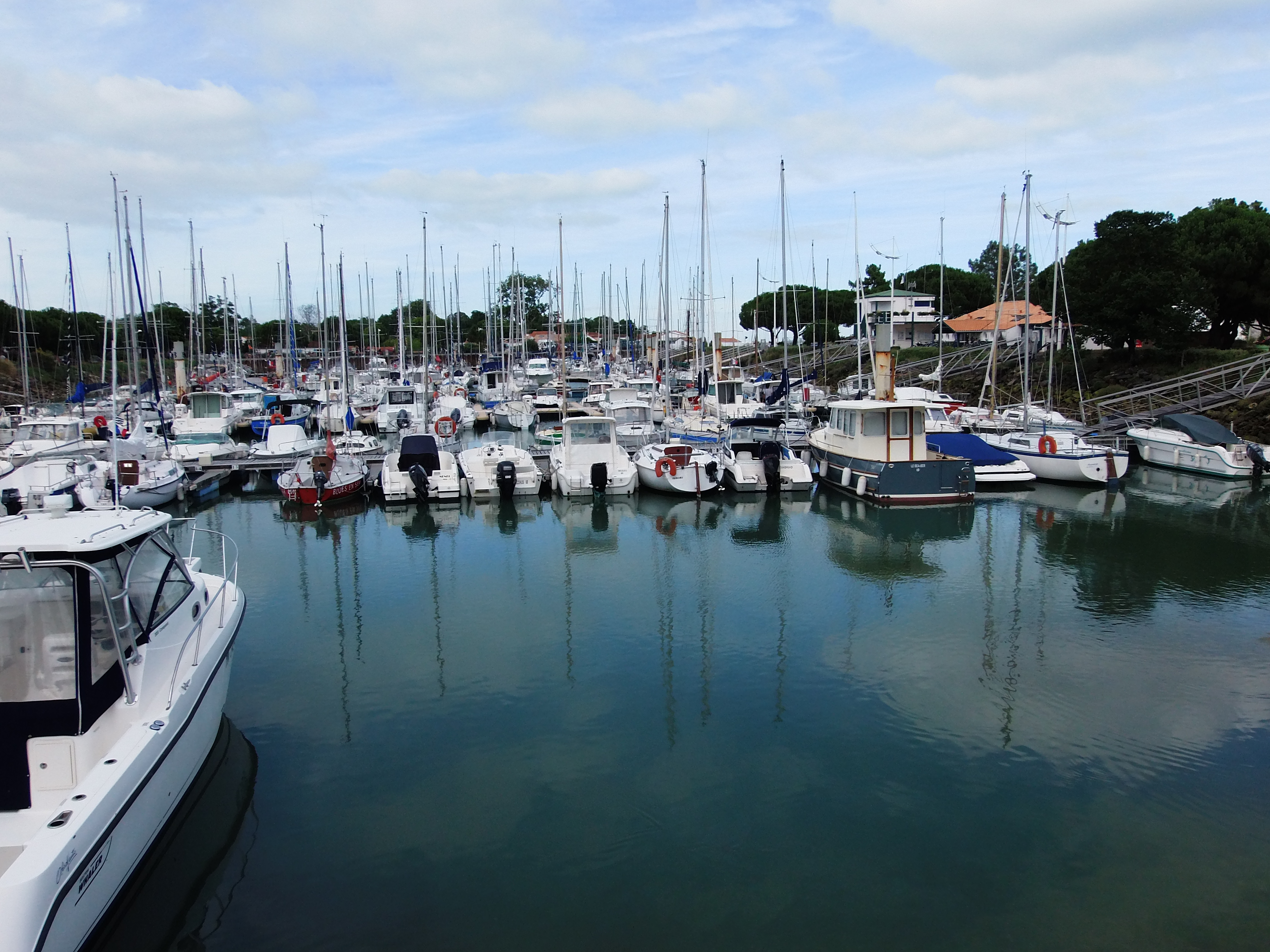 Vue du port de plaisance de Boyardville quartier de Saint-Georges d'Oléron né au début du XIXe siècle avec les débuts de la construction de Fort Boyard (Île d'Oléron, Charente-Maritime, France), juillet 2016.